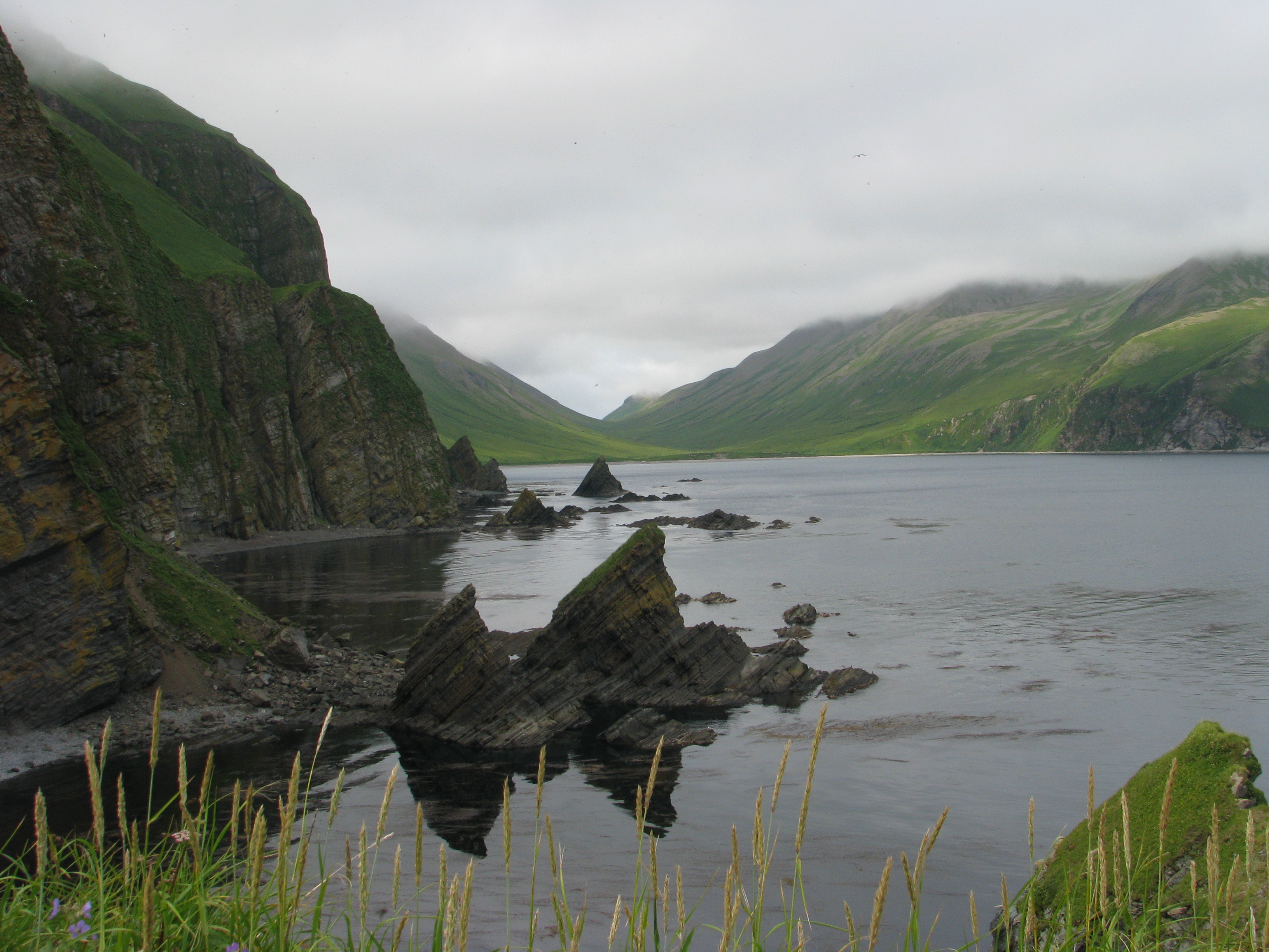 Командорский заповедник, Алеутский район This image is related to the protected area of Russia number 4100007